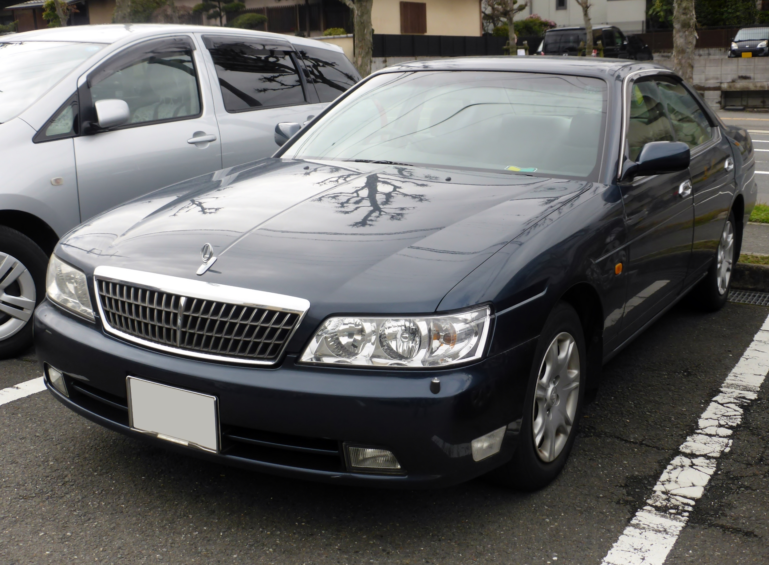 C35型日産・ローレルメダリストをフロントから撮影。